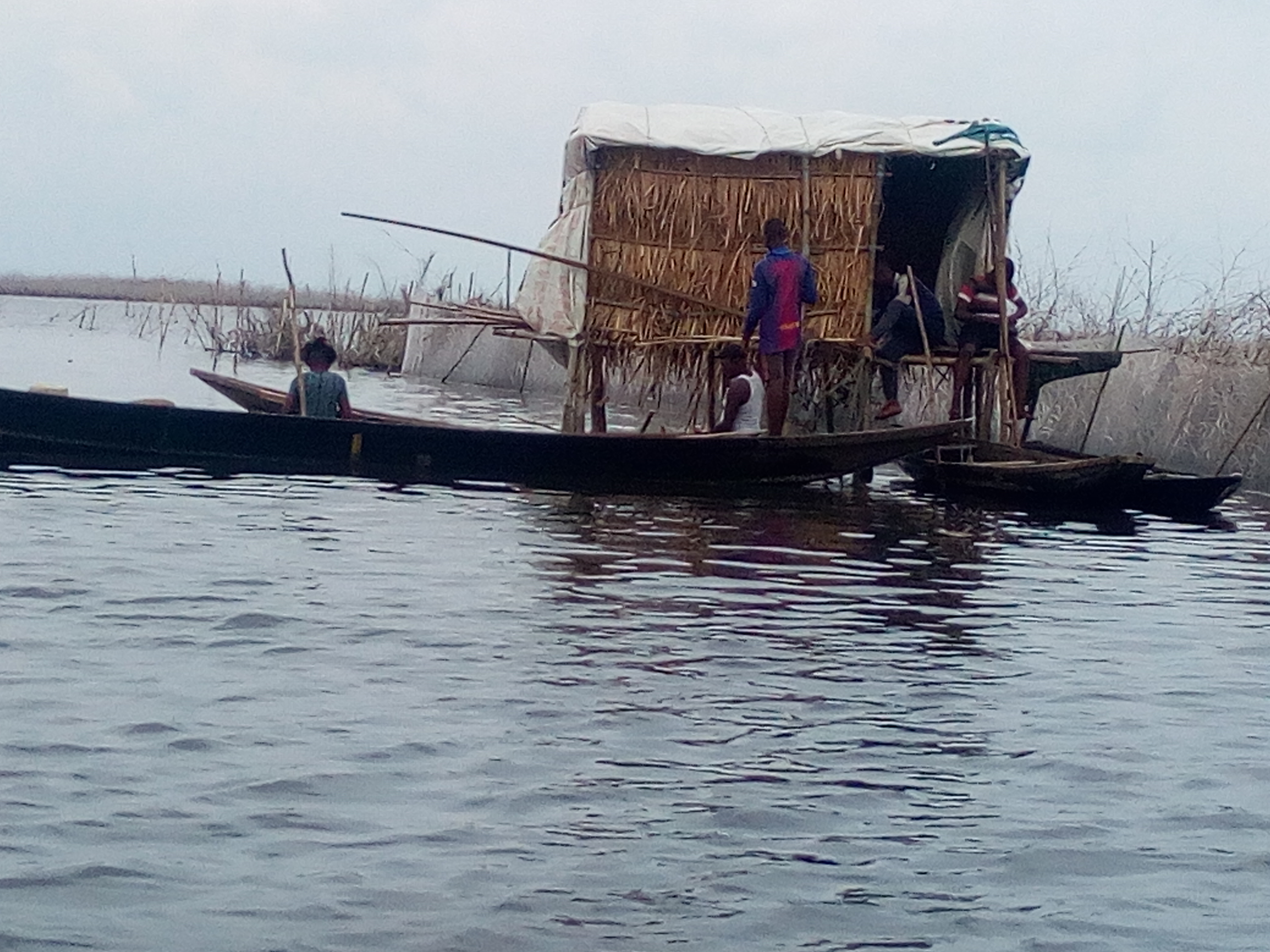 Des acadja construit sous haute surveillance